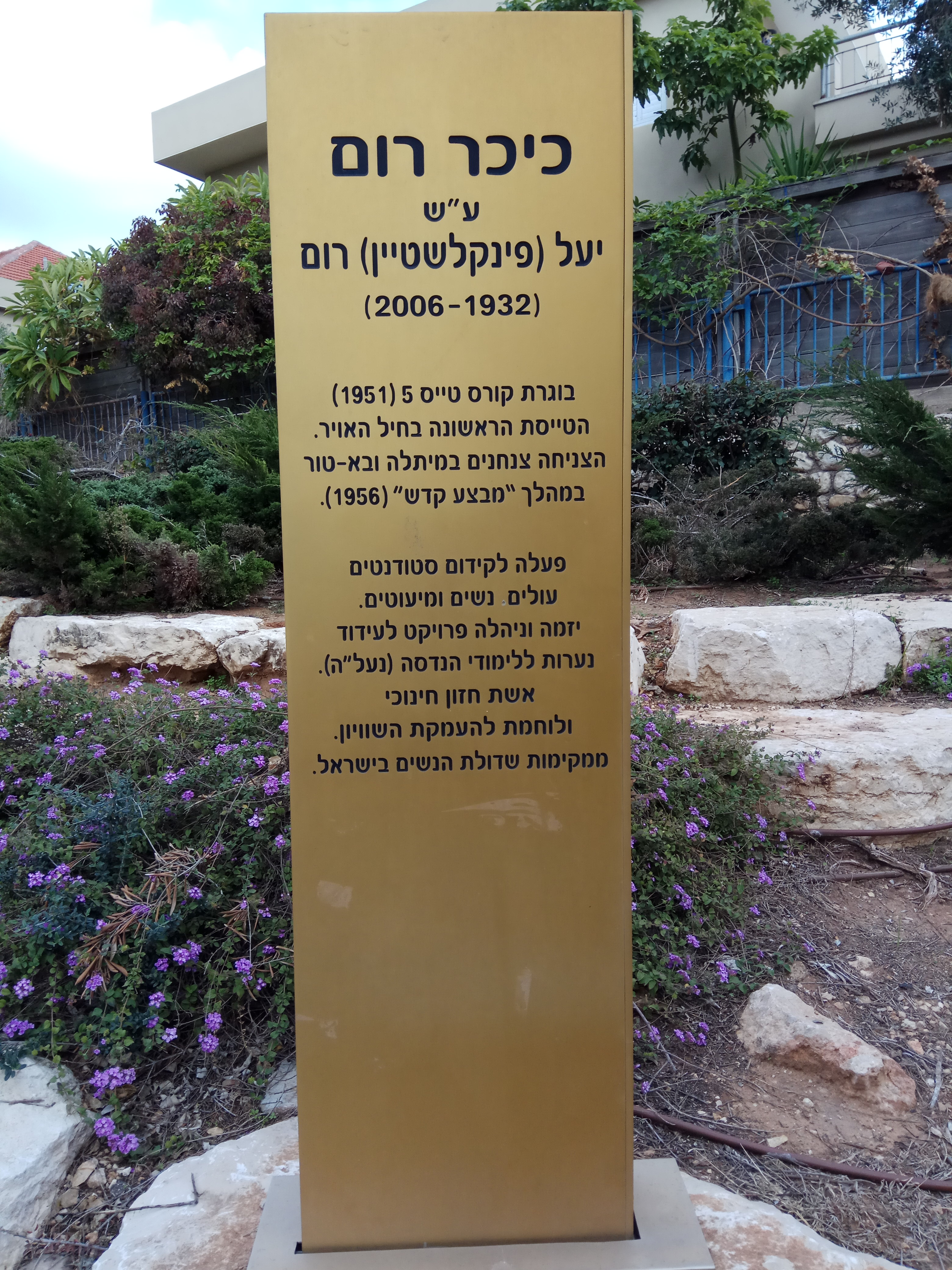 כיכר יעל רום ברחוב פינסקר בהרצליה